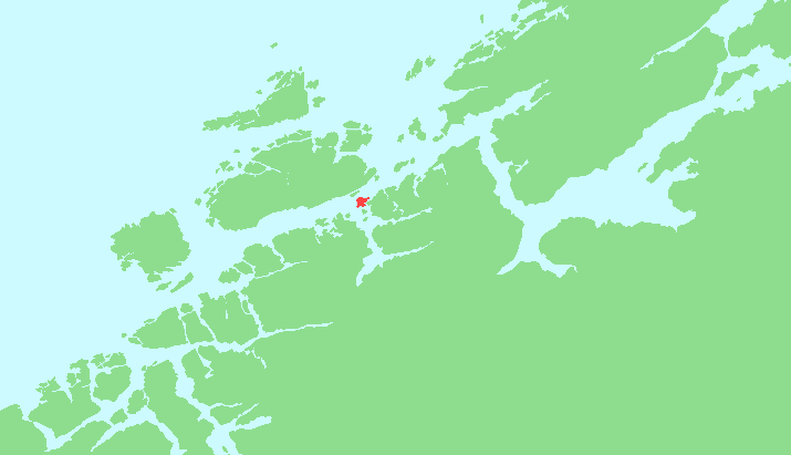 Locator map of Hemnskjel, Sør-Trøndelag, Norway